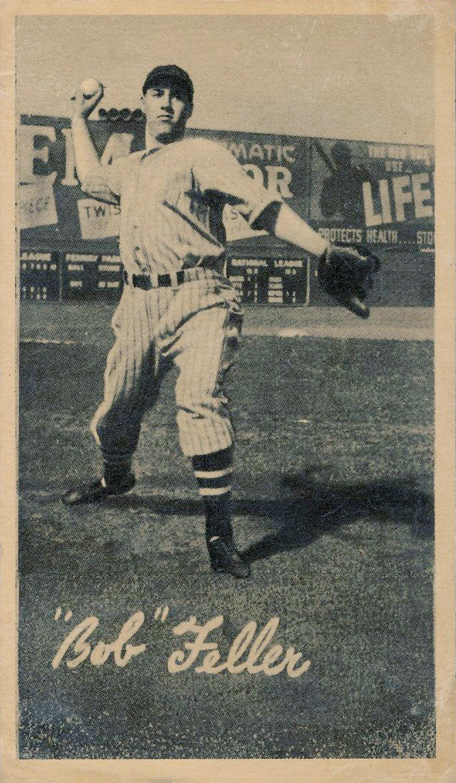 1936 Goudey Wide Pen Bob Feller